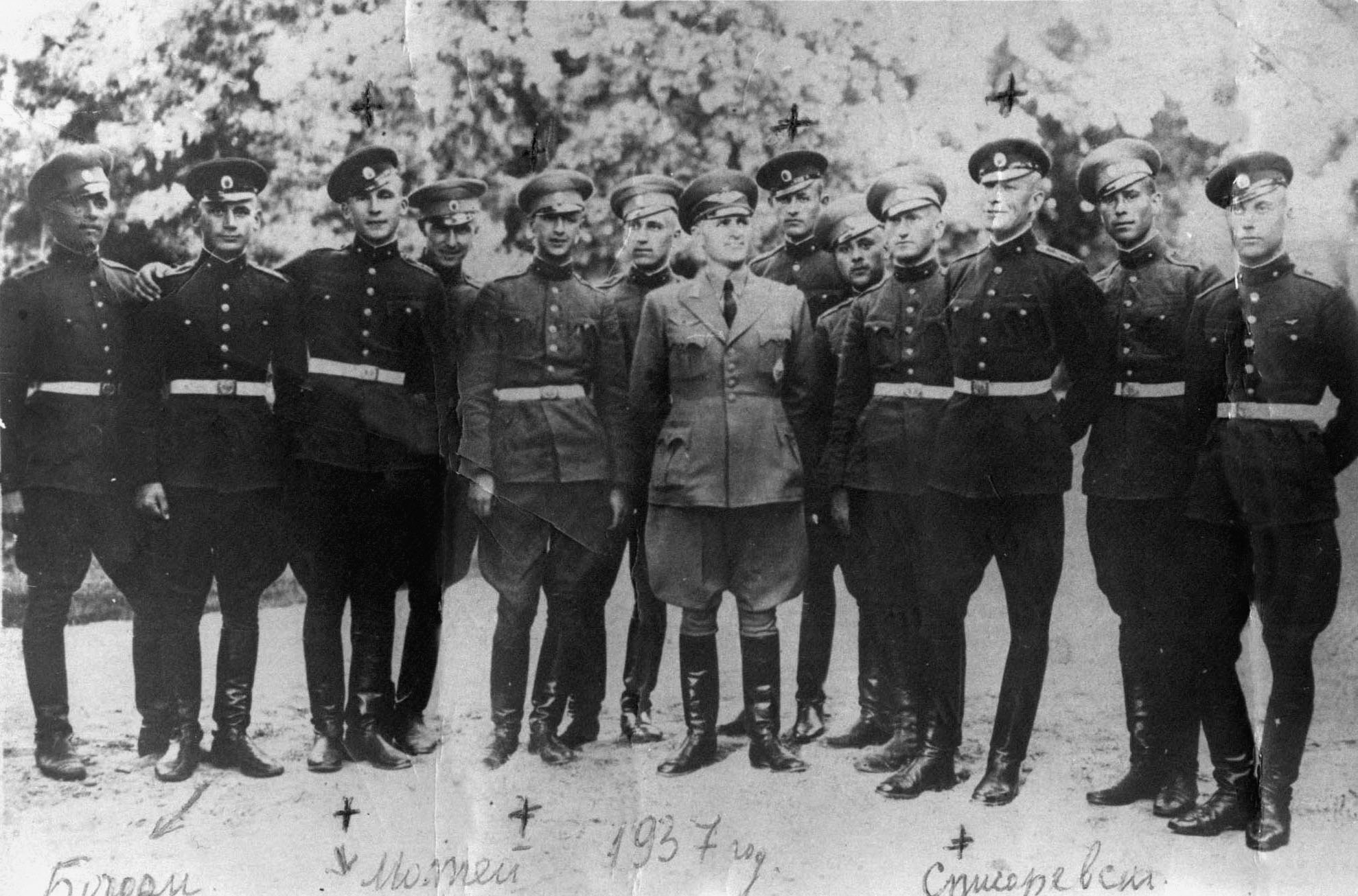 Юнкери летци наблюдатели. Отляво вторият - Богдан Илиев, третият - Матей, отдясно третият - Димитър Списаревски